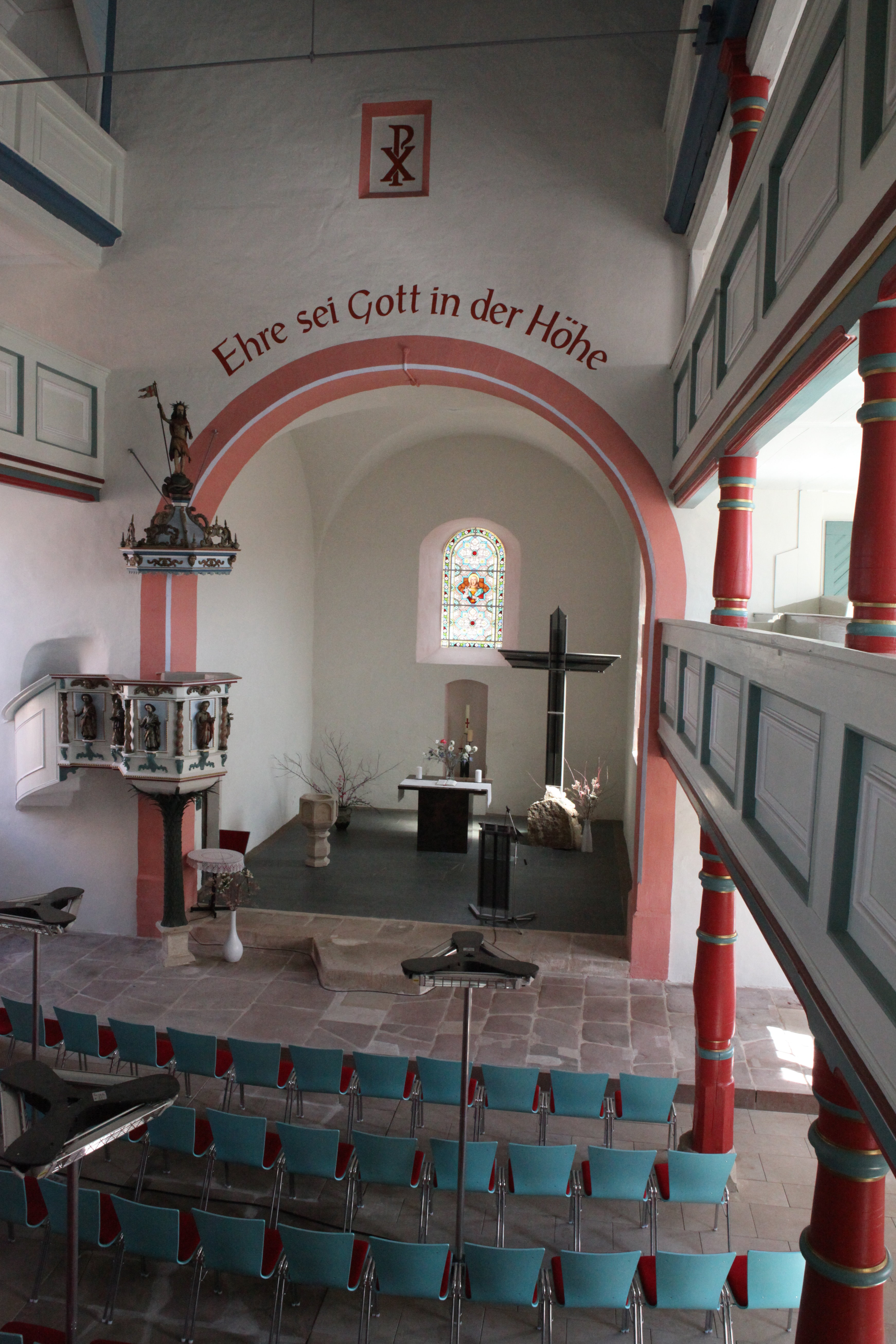 Pfarrkirche St. Kilian in St. Kilian